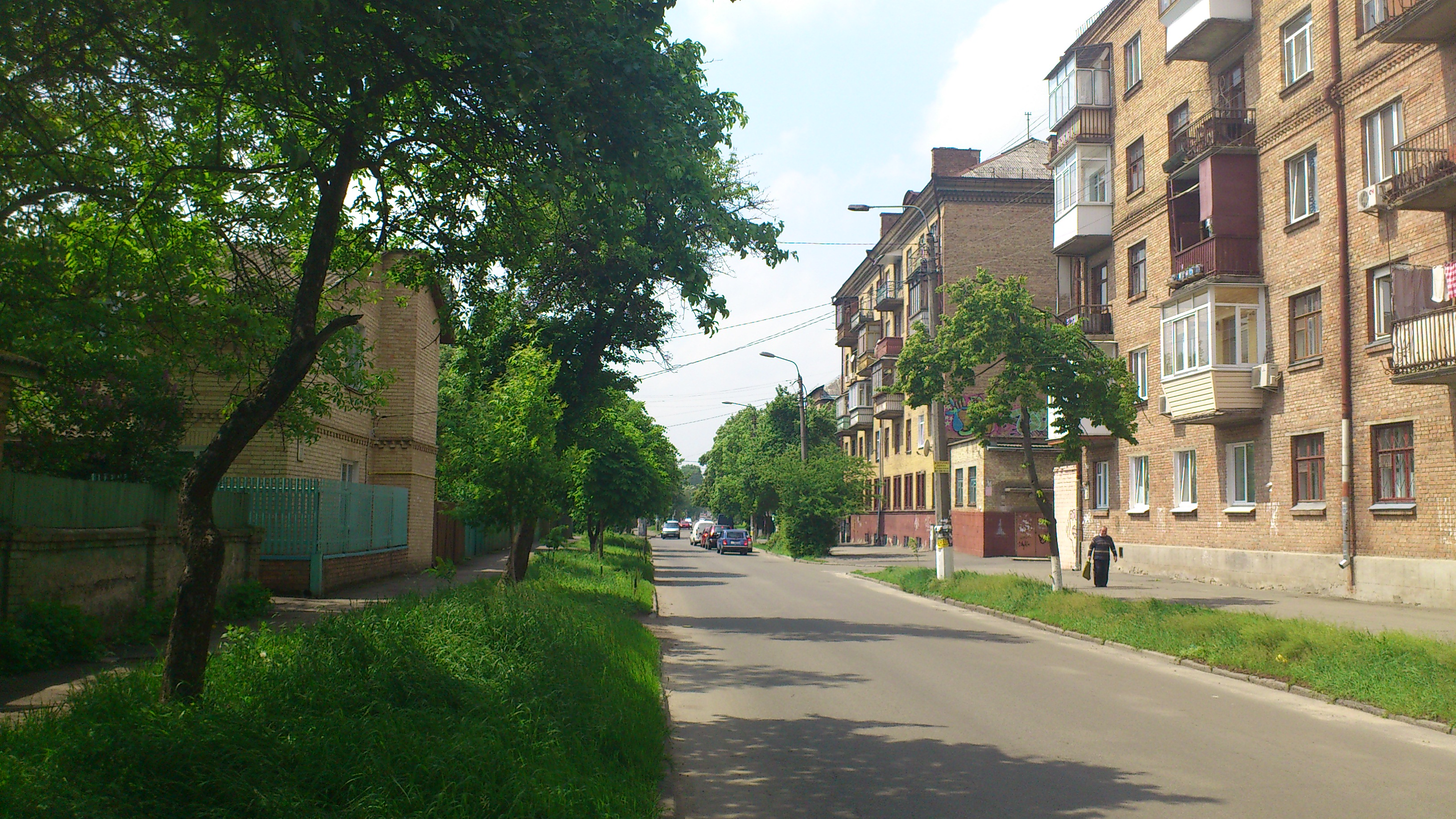 вулиця Естонська, м. Київ. На задньому плані вулиця Щербакова